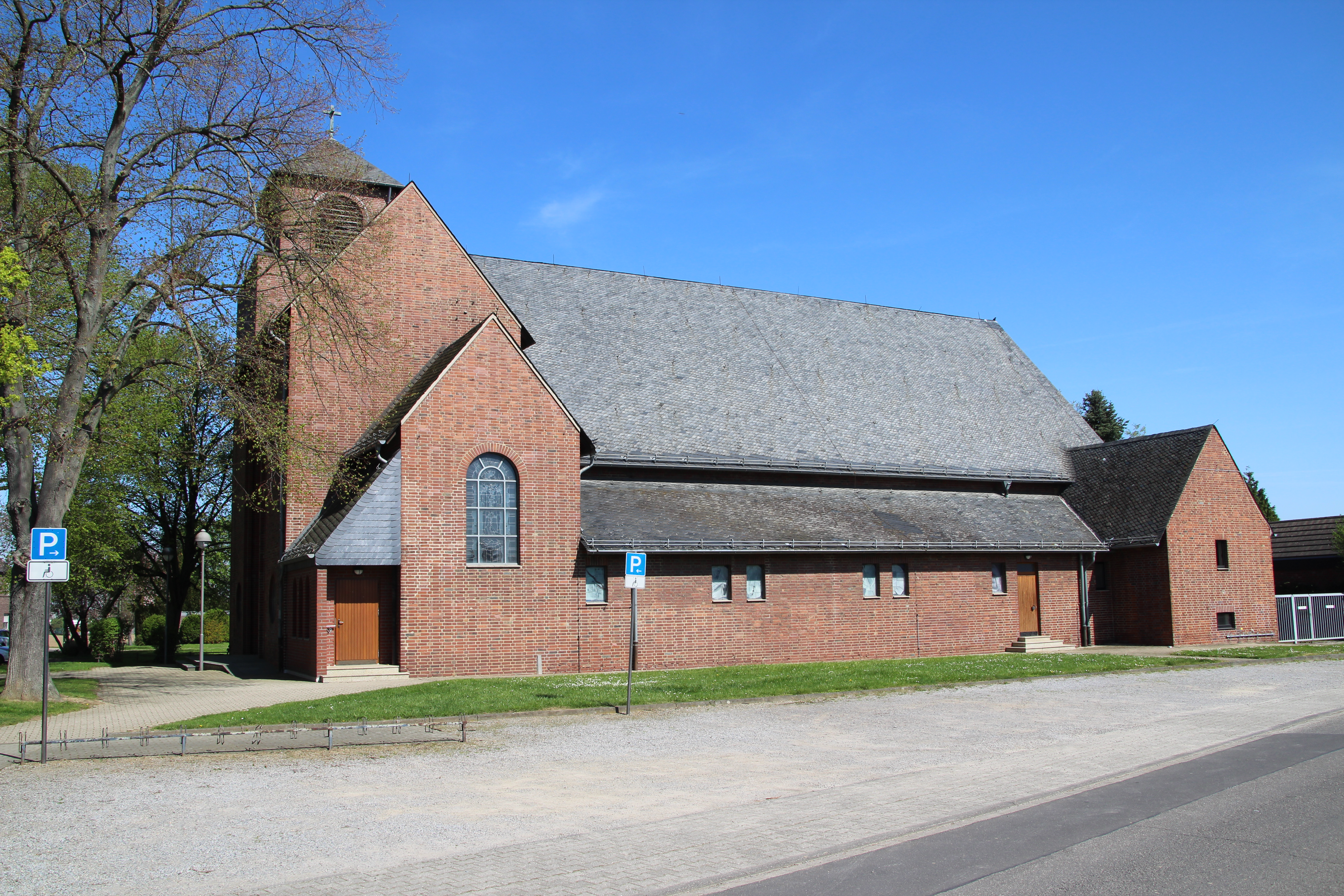 Kath. Pfarrkirche St. Martinus in Schlich